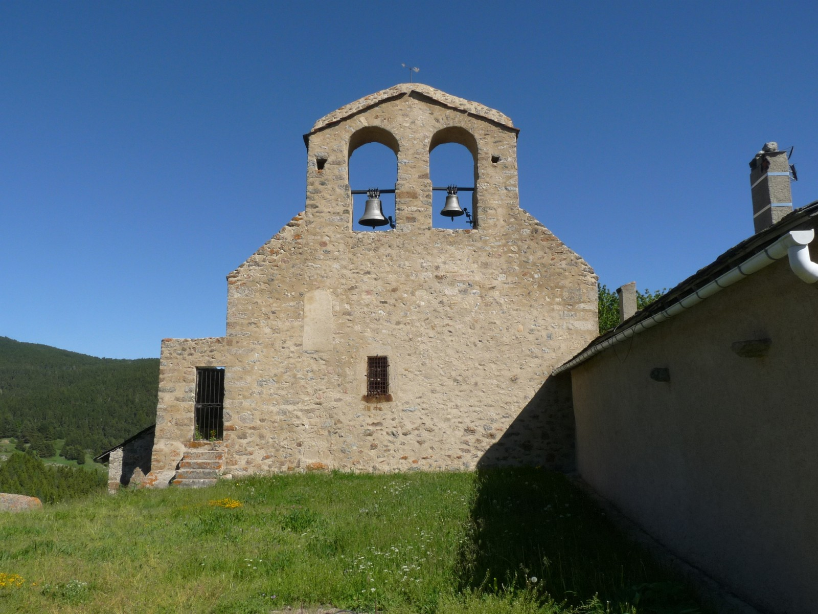 Eglise de La Llagonne, Pyrénées-Orientales, France